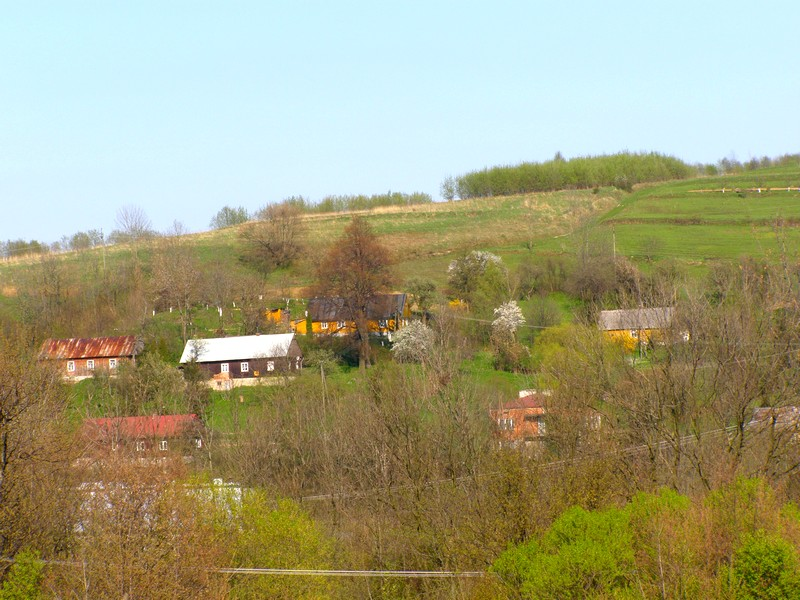 Draganowa charakterystyczna zabudowa. Część wsi zwana "Szuliki".